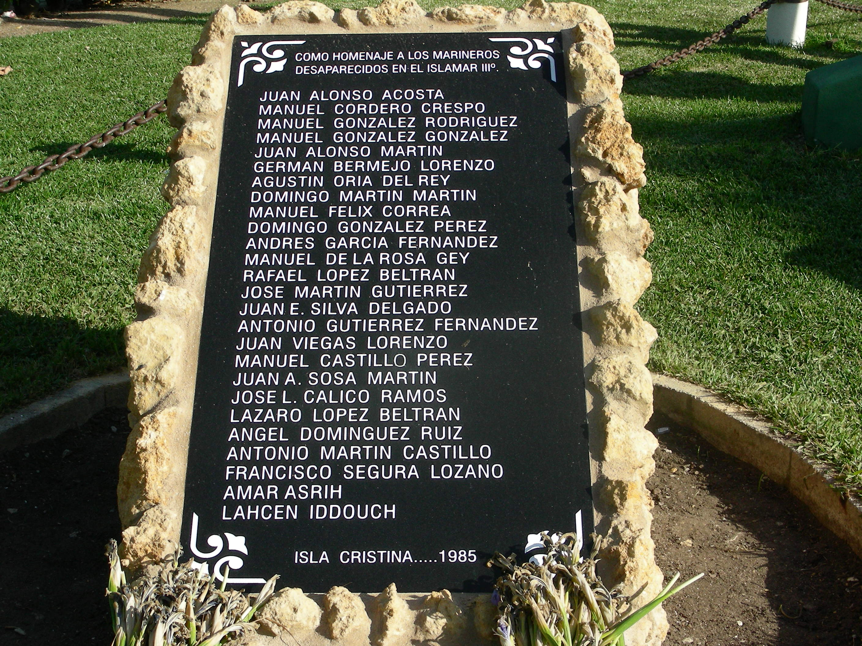 placa del monumento al naufragia del Islamar III en Isla Cristina